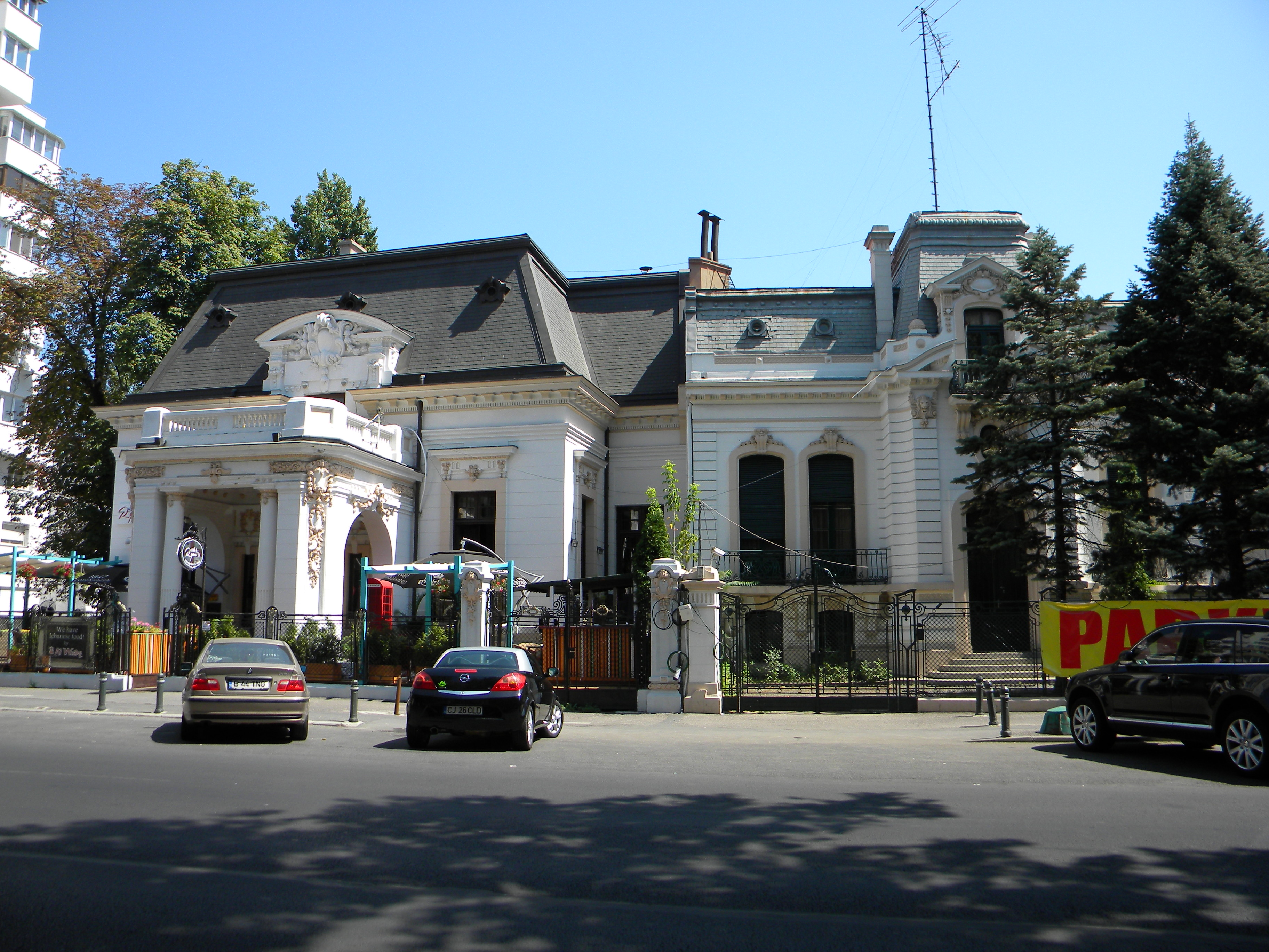 Casa Constantin (Dinu) I.C. Bratianu, pe Calea Dorobantilor nr. 16, Bucuresti, sect. 1